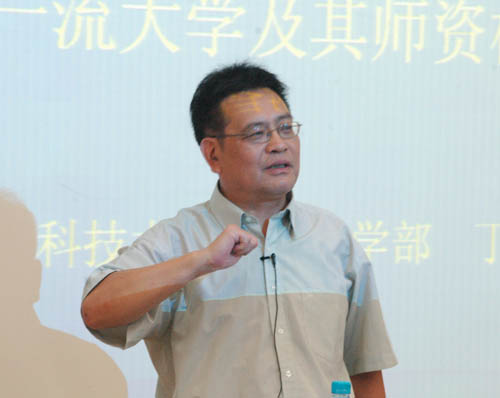 香港科技大學社會科學部教授丁學良。